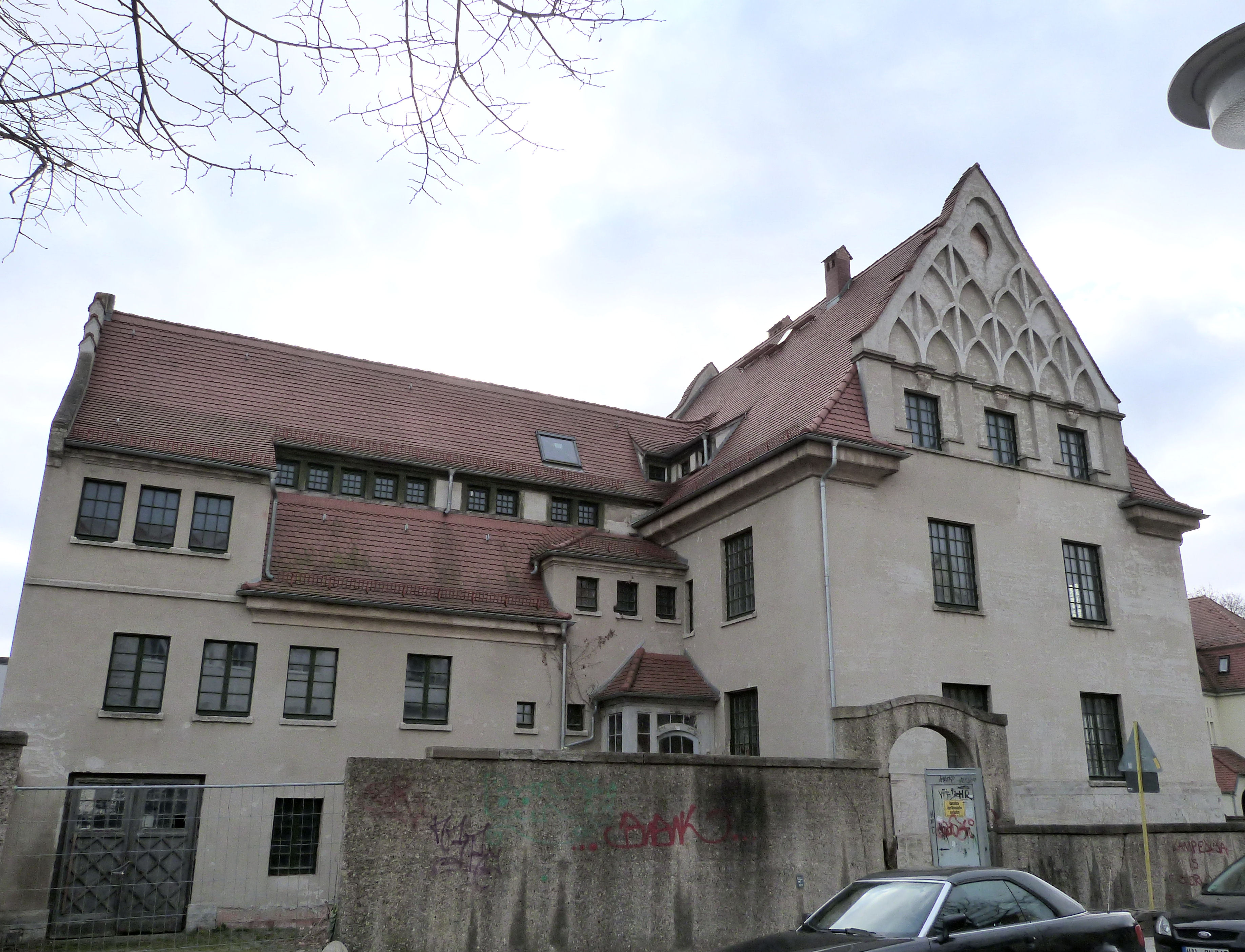 Villa Hoffmann, Ernestusstraße 27, Halle (Saale)